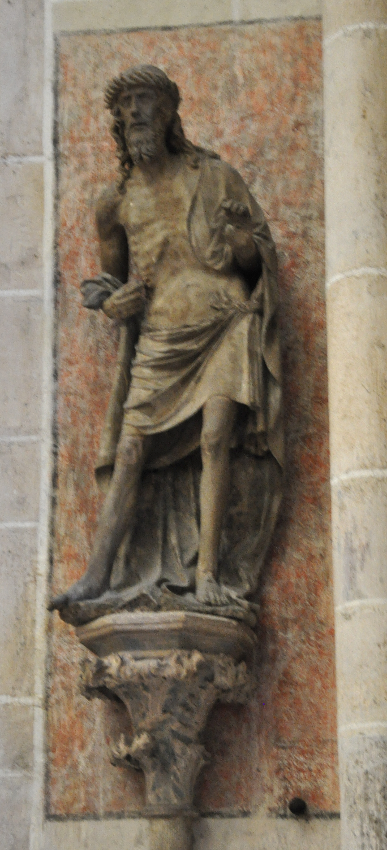 Ulm, Ulmer Münster, Schmerzensmann von Hans Multscher vom Hauptportal (dort inzwischen Kopie)